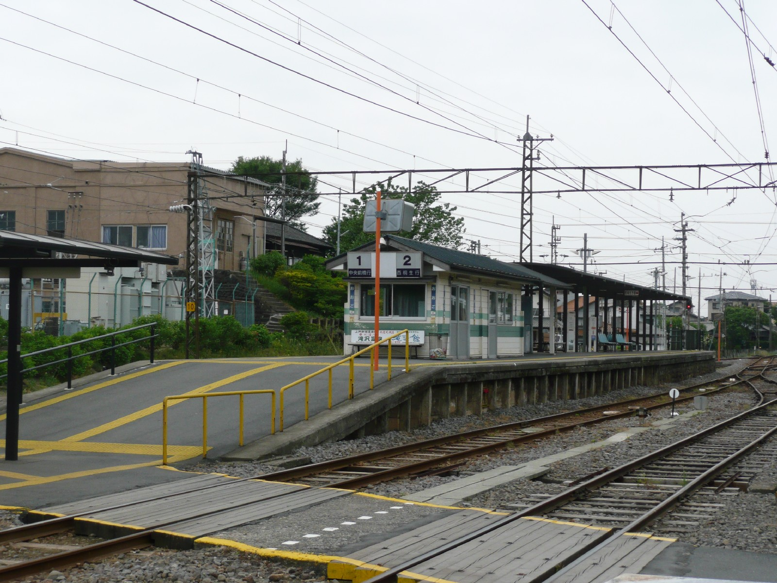 大胡駅ホーム